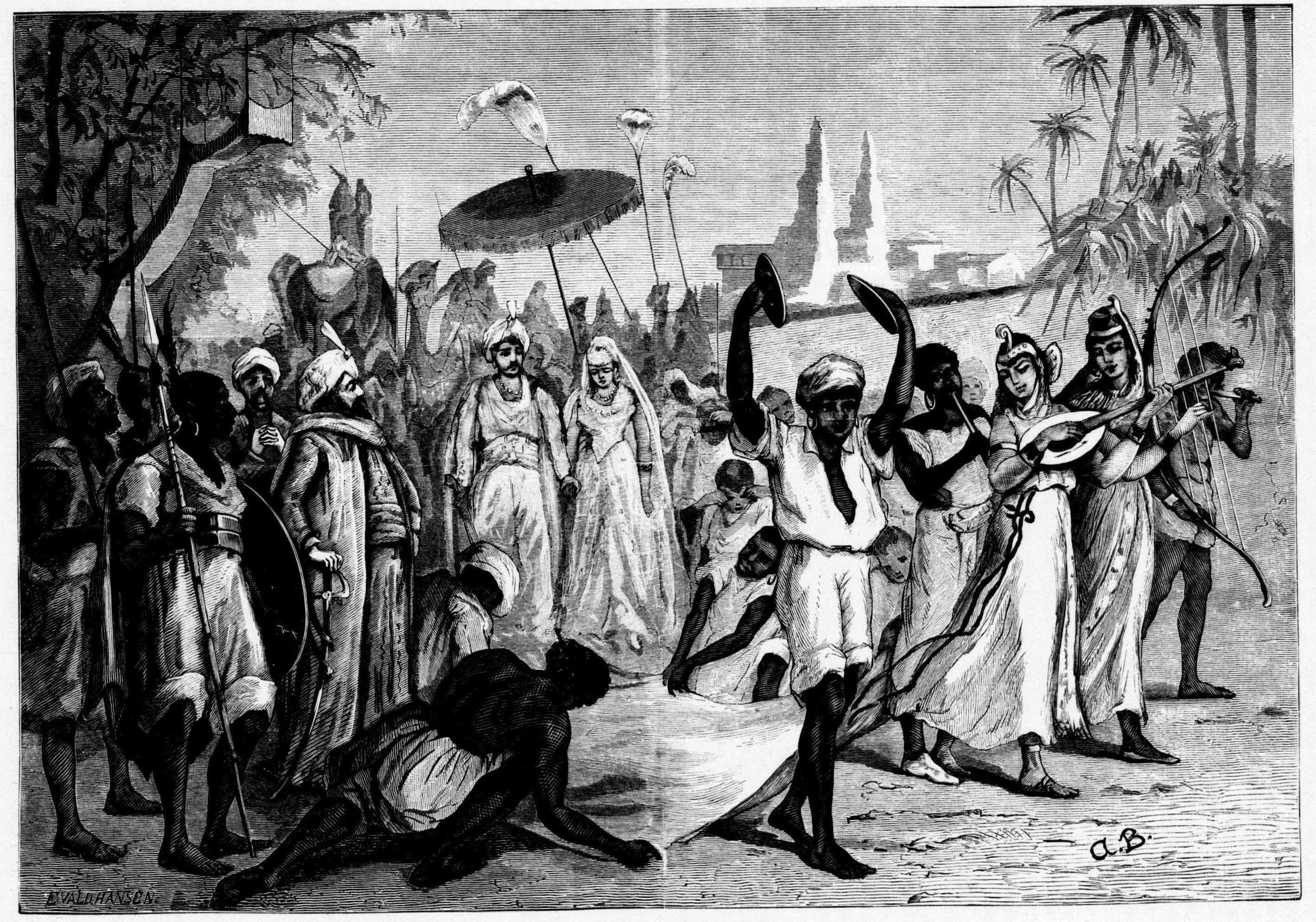 Scene from the opéra-comique Si j'étais roi by Adolphe Adam